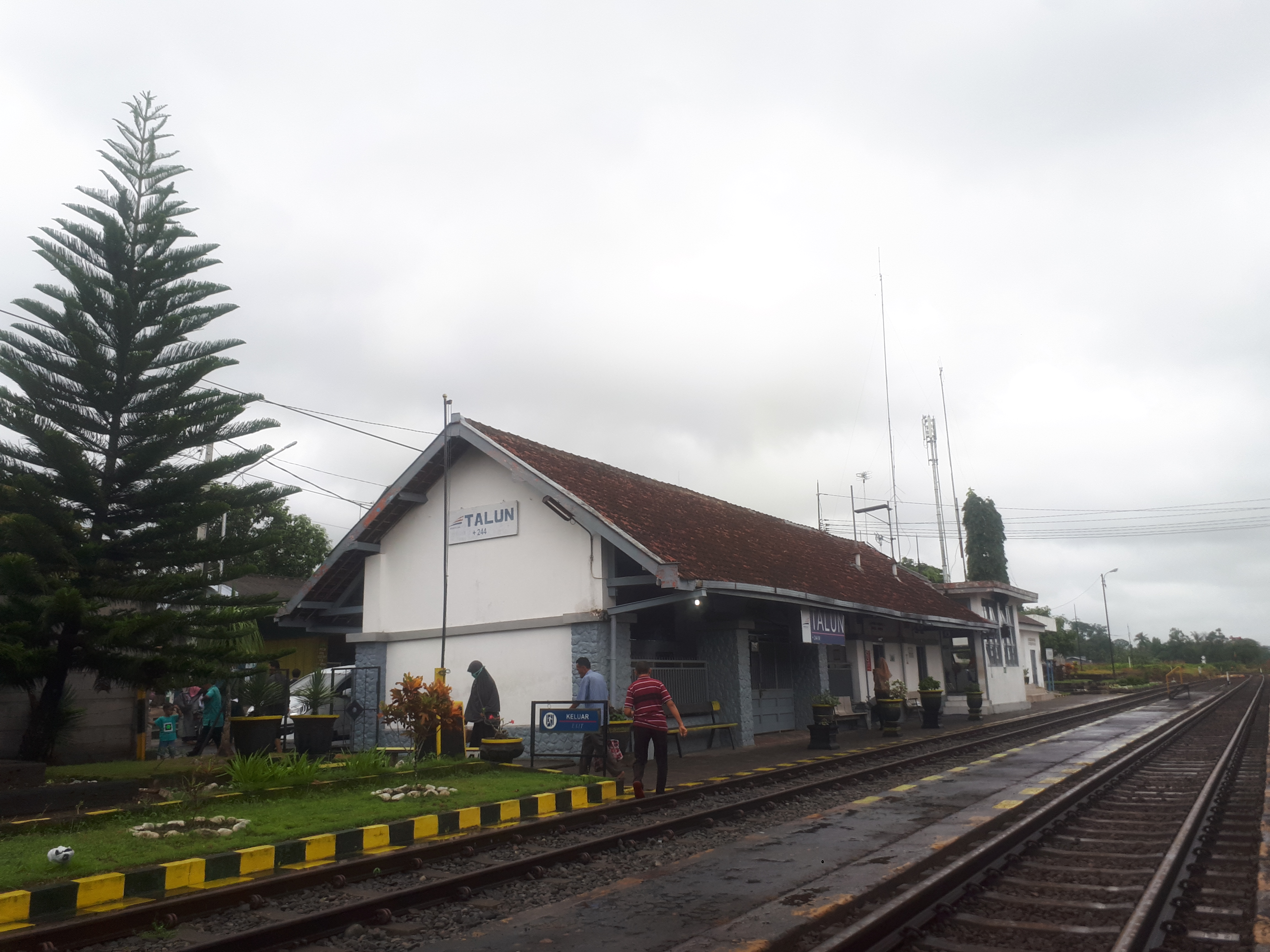 Stasiun Talun pada tahun 2020